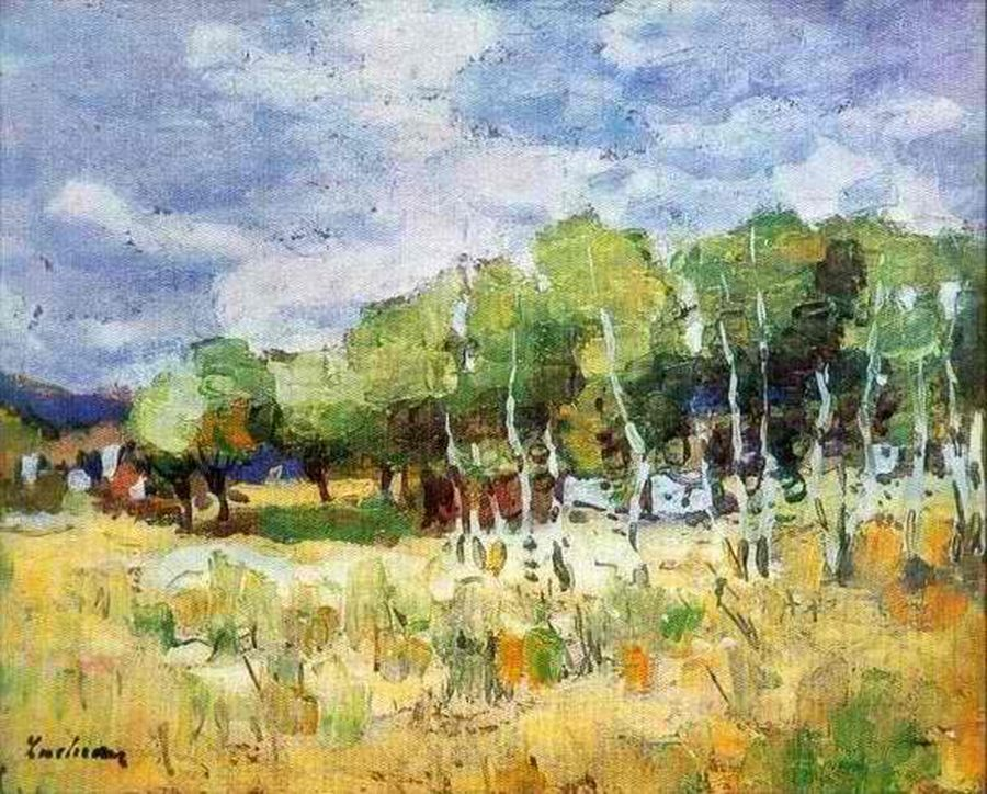 După ploaie la Moinești